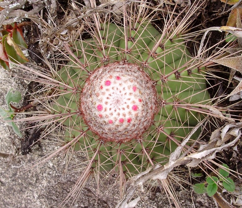 Pernambuco Brasil